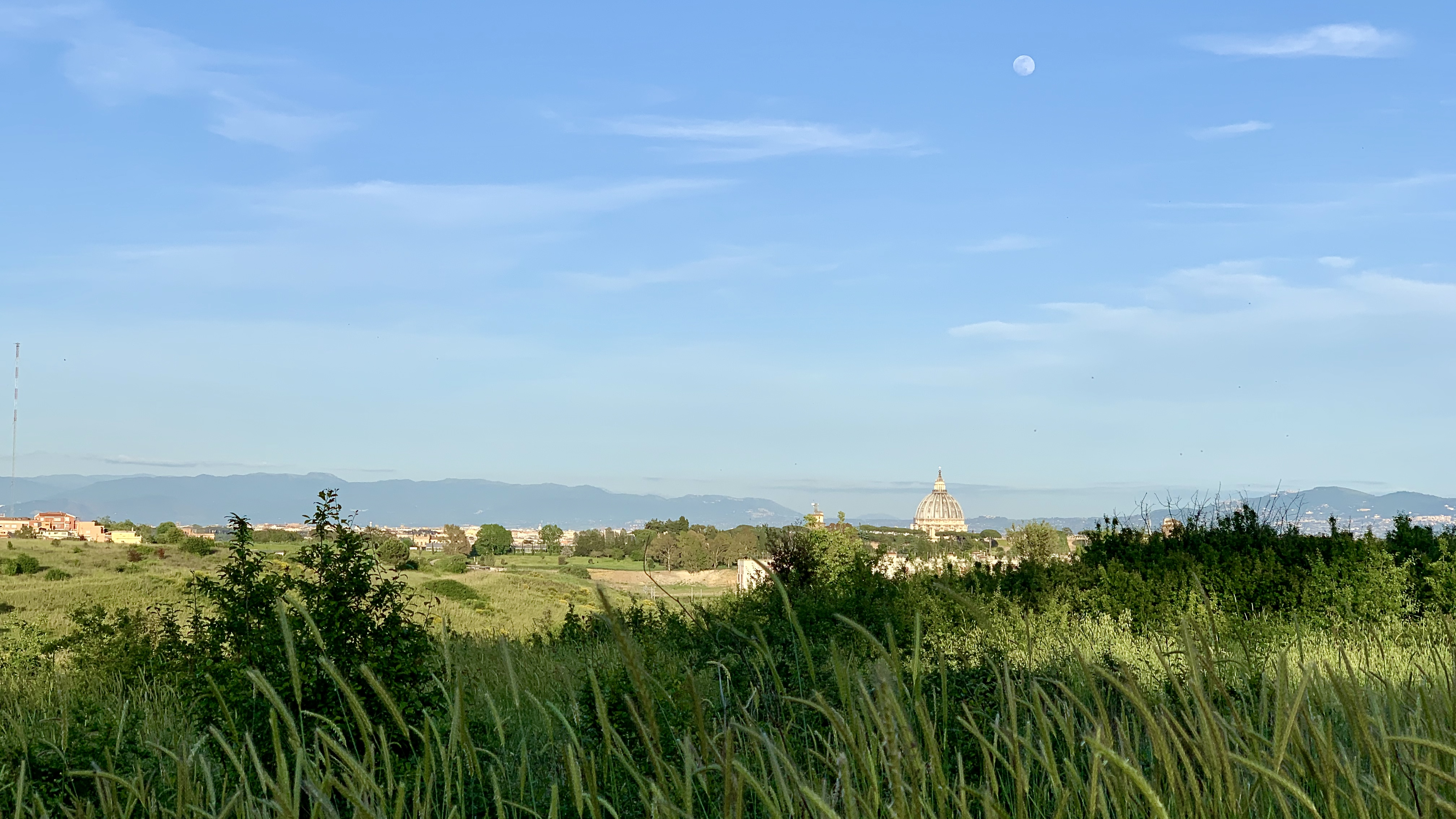 parco regionale urbano del Pineto (Q3895760)